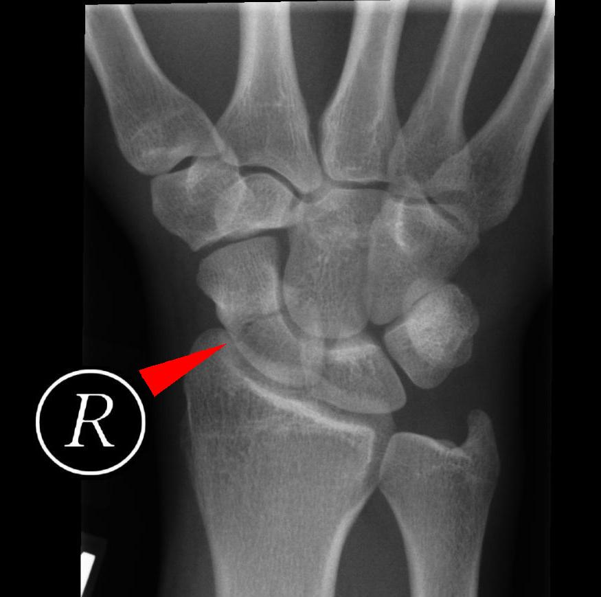 Röntgenbild einer Kahnbeinfraktur eines 20jährigen Patienten. Die Fraktur wurde mit einem Pfeil markiert.